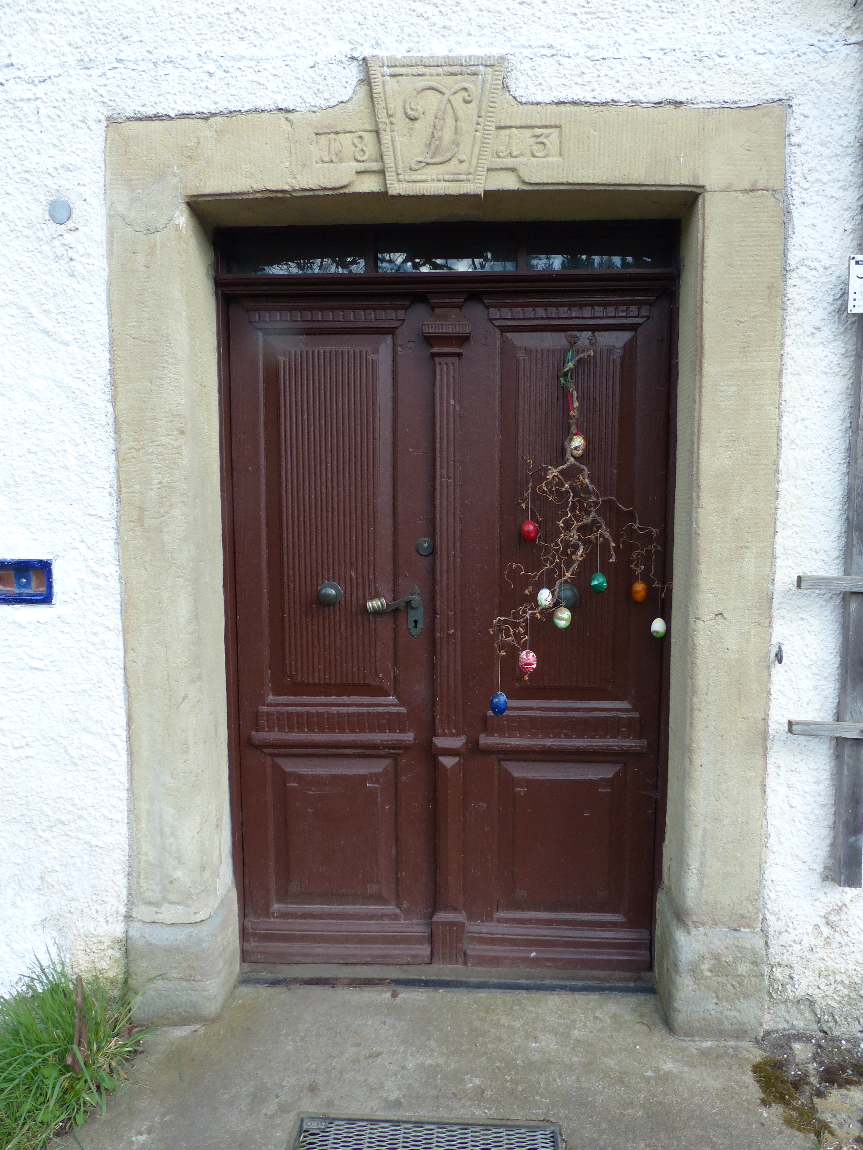 Ansicht vom Dorschenhammer, Ortsteil von Schauenstein